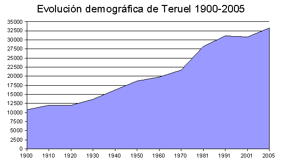 Población de Teruel capital, España, (1900-2005). Fuente de datos INE. En el período 1900-1991 los datos se refieren a población de hecho. A partir de 1996 se sigue el nuevo sistema de gestión continua e informatizada de los Padrones municipales, basado en la coordinación de todos ellos por parte del INE.